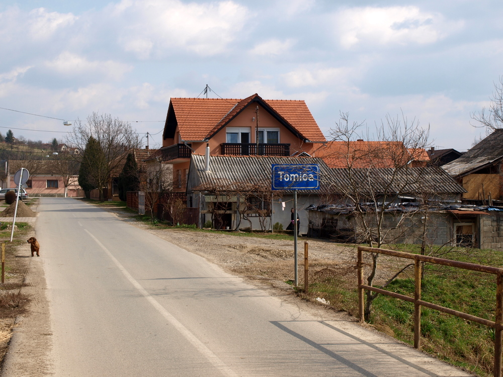 Ulaz u selo Tomica, Brodsko-posavska županija.